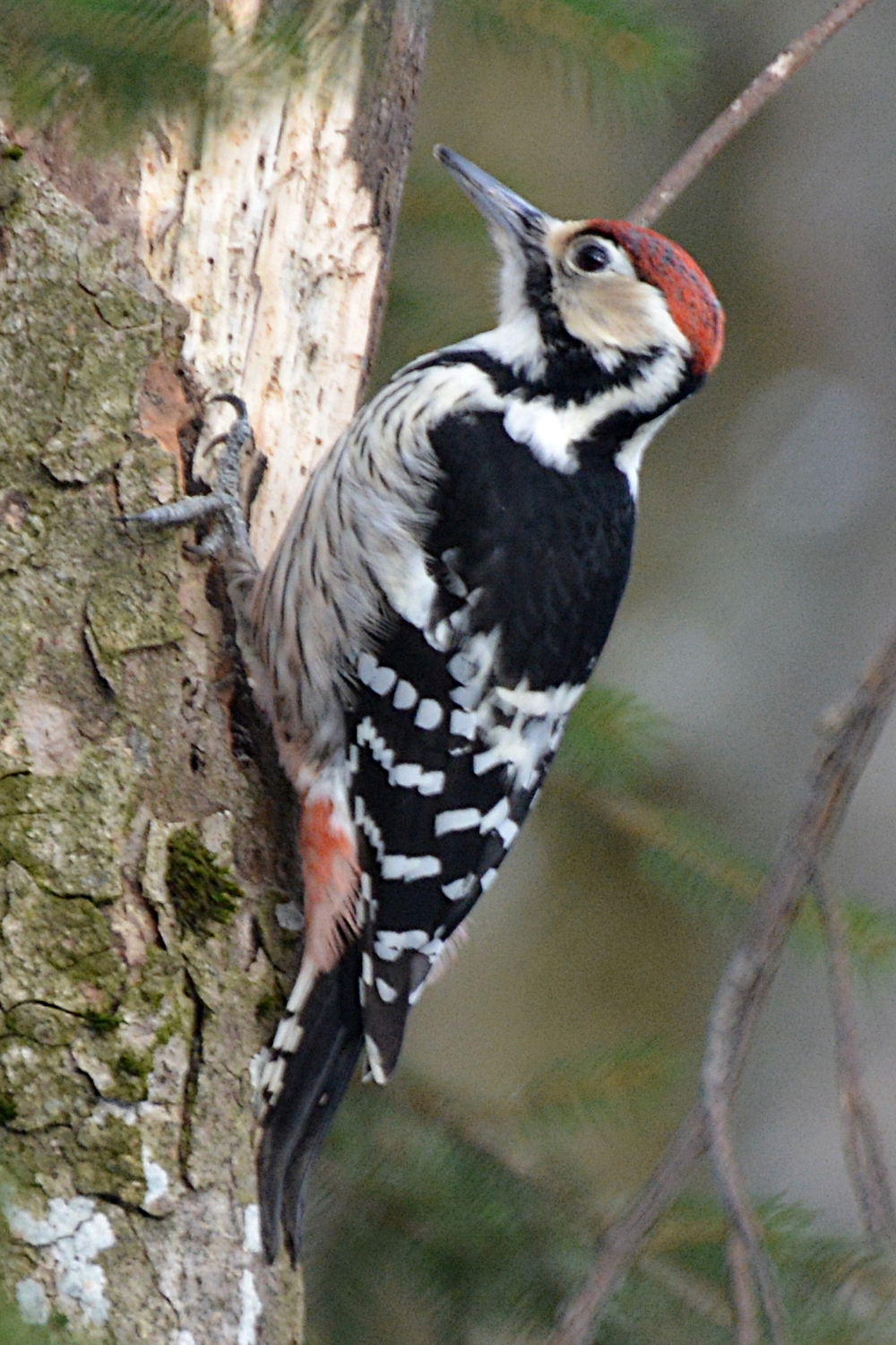 Männlicher Weißrückenspecht bei der Nahrungssuche.